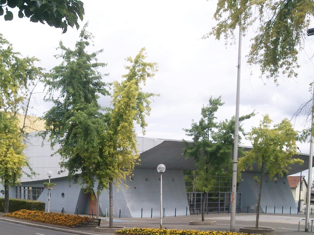 Espace culturel de Drancy